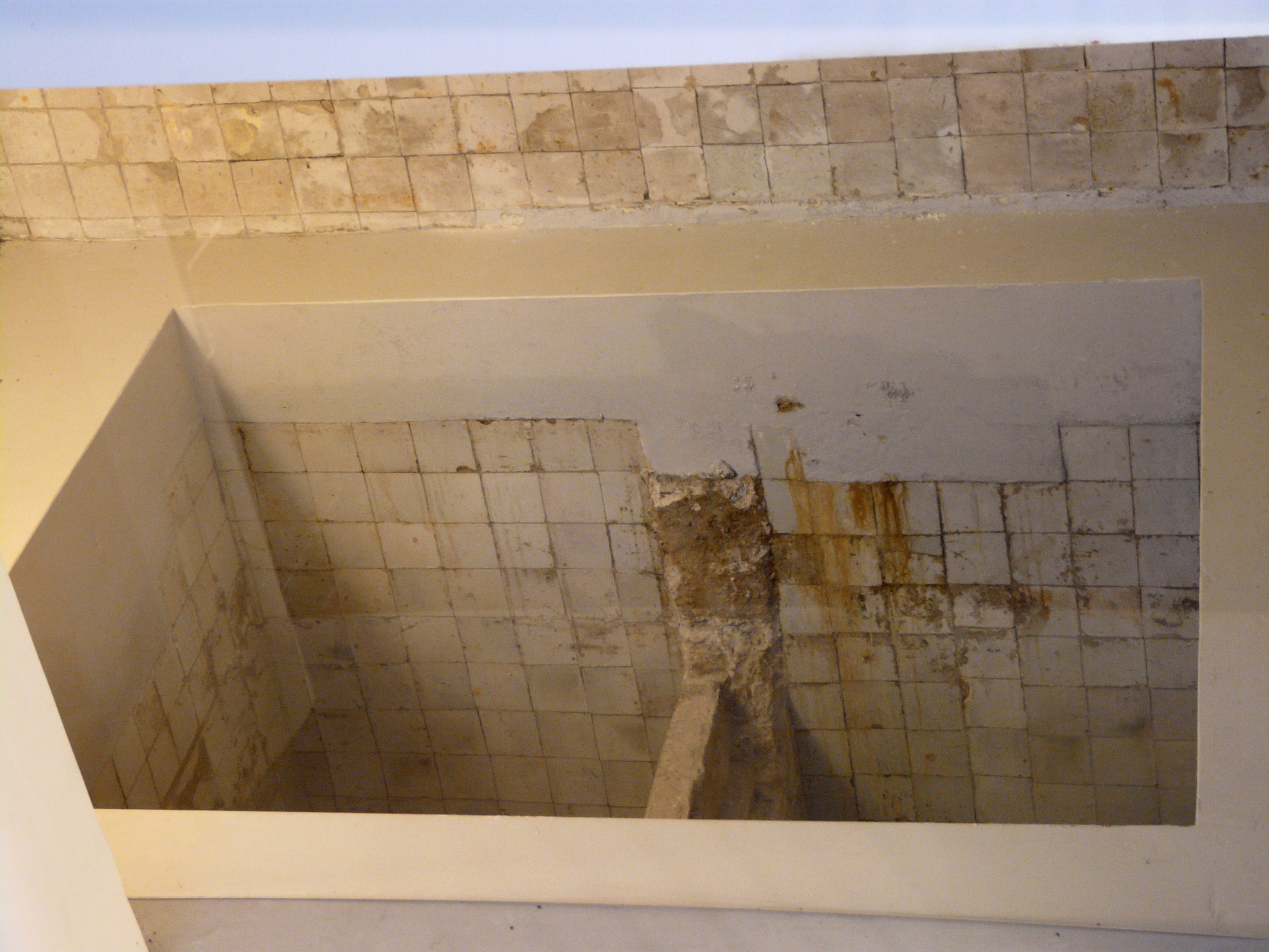 Mikwe Mikwe, bad voor rituele reiniging. Gevonden in het gebouw waar nu het Joods Historisch Museum in Amsterdam is gehuisvest. Mikwe, bath for ritual cleaning. This mikwe was found in the building which now houses the Jewish Historical Museum in Amsterdam. Foto gemaakt tijdens WLANL foto workshop op 1 juni in het Joods Historisch Museum, Amsterdam